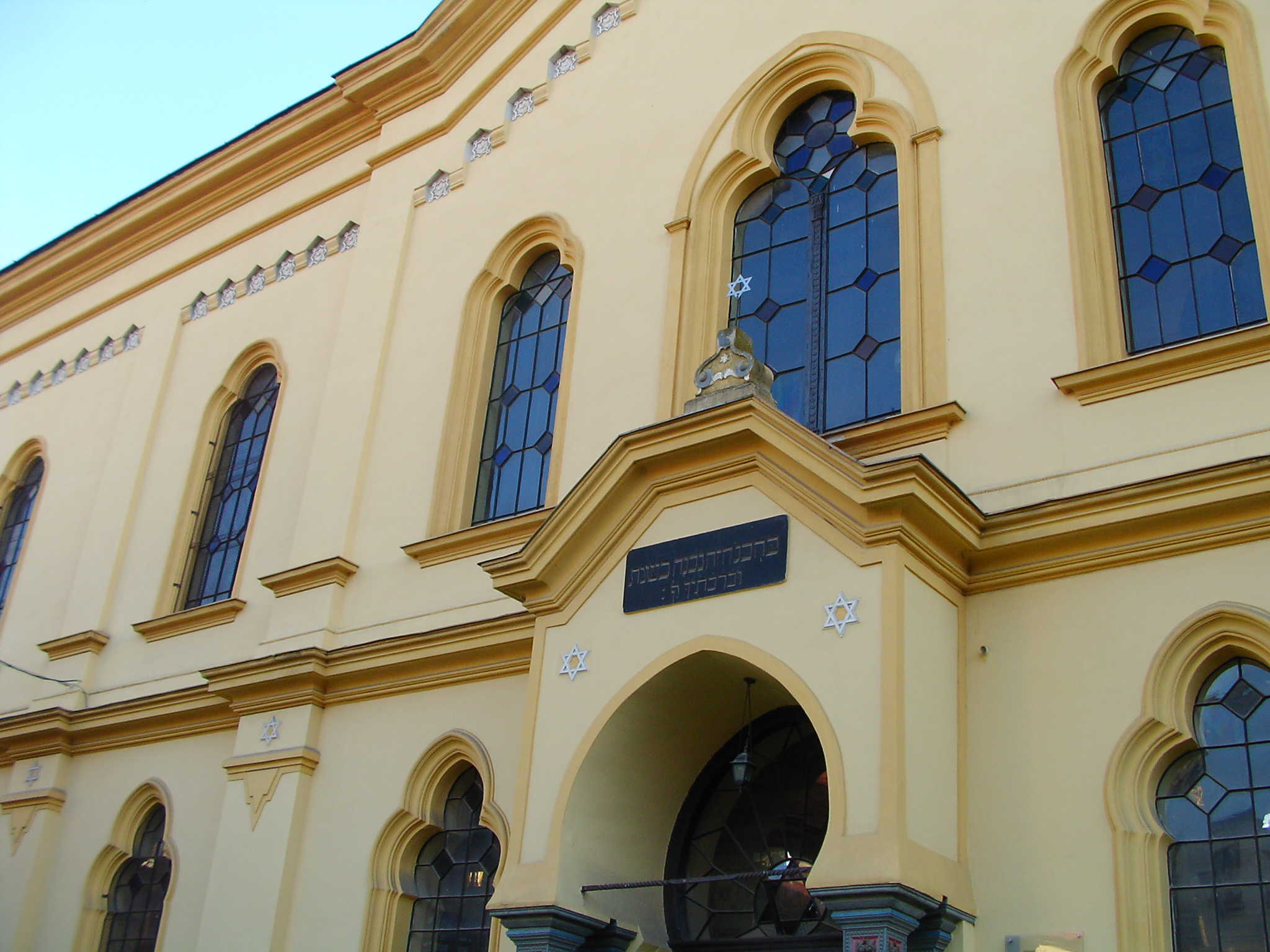 בית כנסת בפרשוב